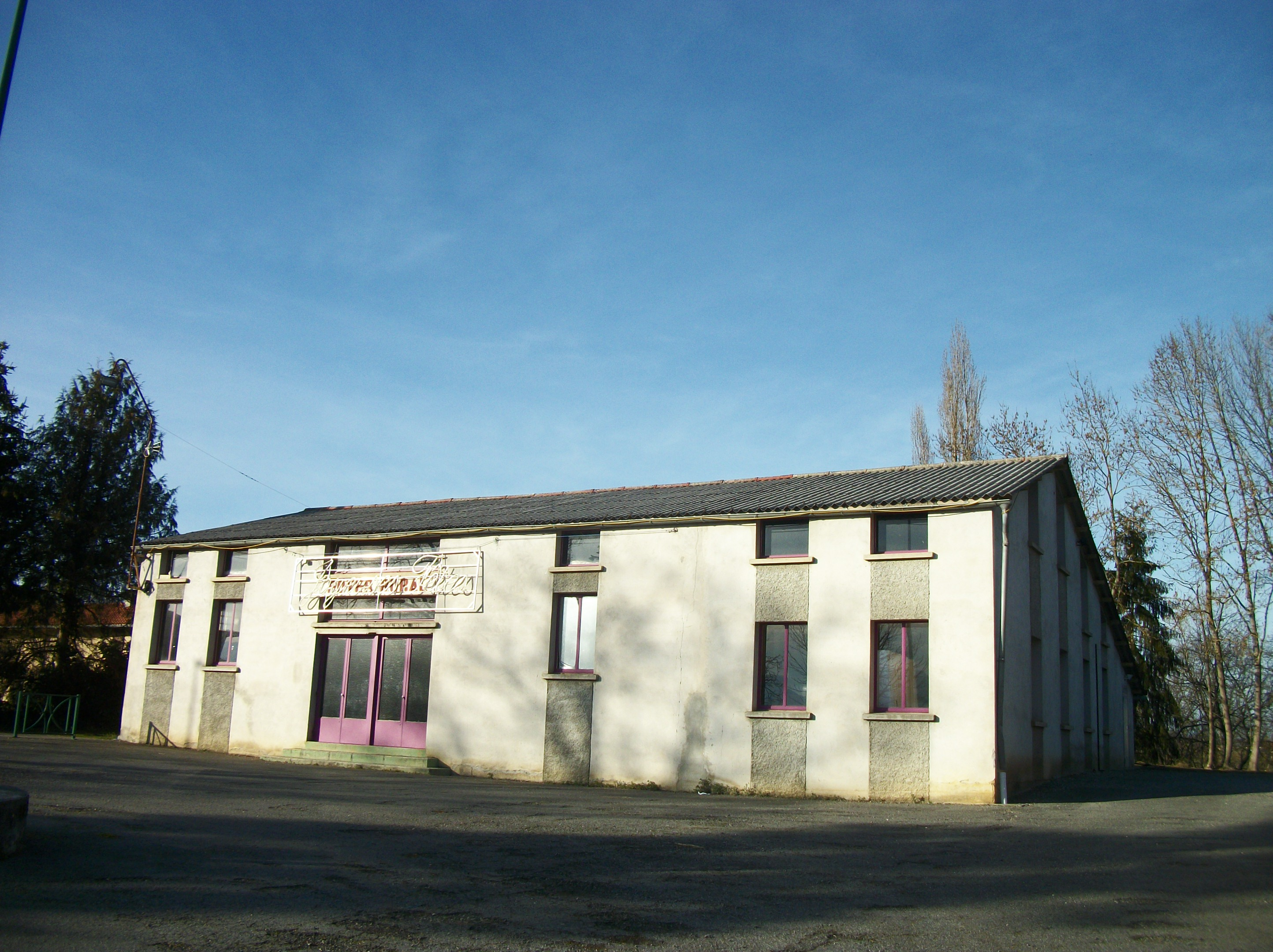 Foyer rurale